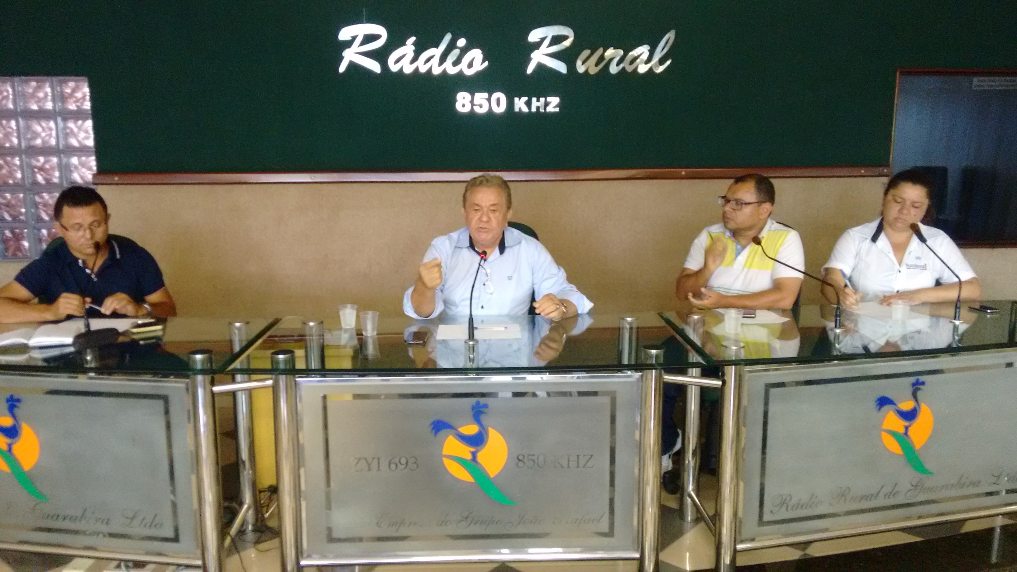 Empresário João Rafael é entrevistado por radialistas da Rádio Rural de Guarabira